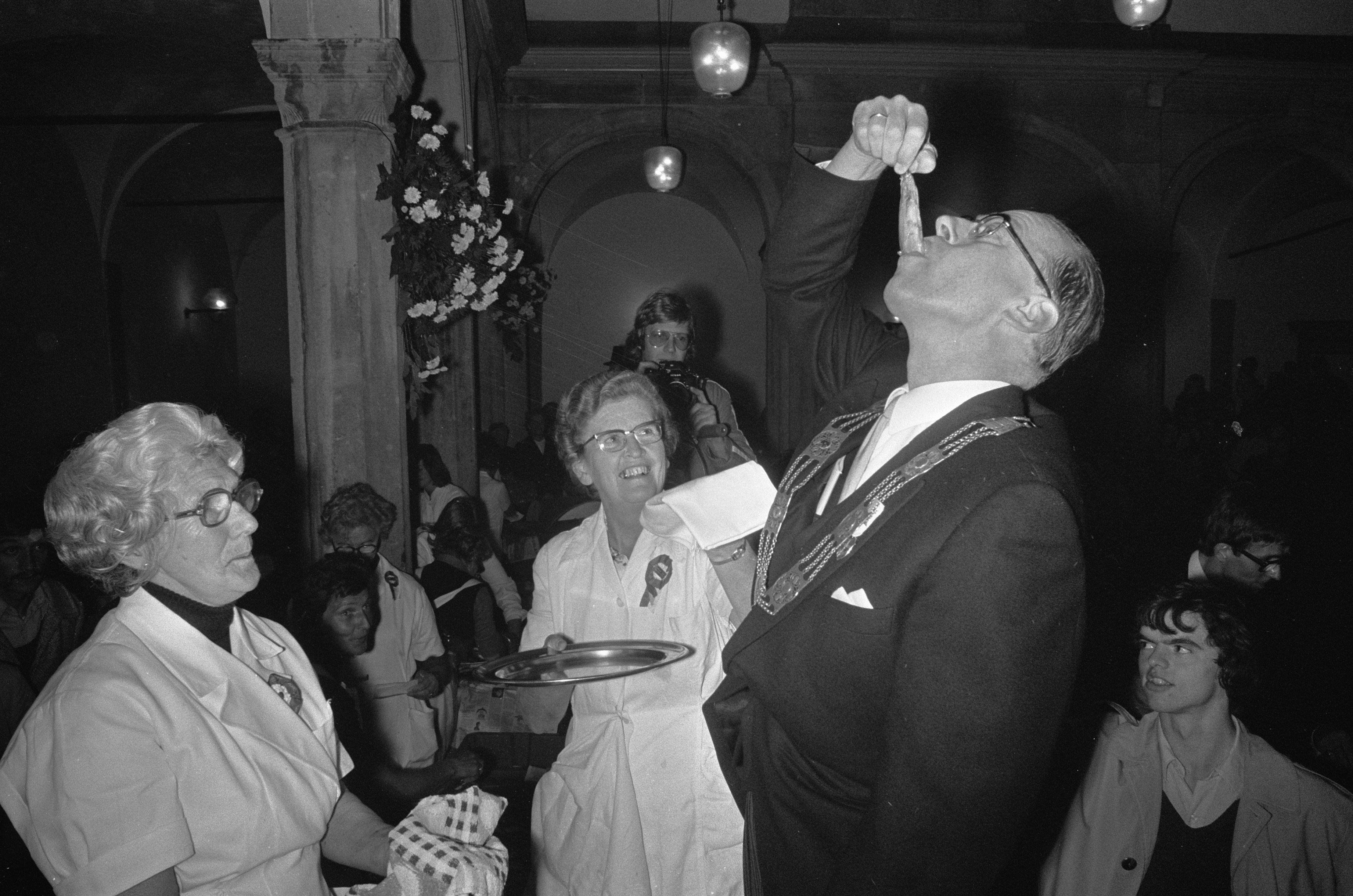 Leidens Ontzet 1973 (3 oktoberfeest). Viering Leidens ontzet (1574) met uitdelen haring en wittebrood, Burgemeester mr. A. Vis eet haring